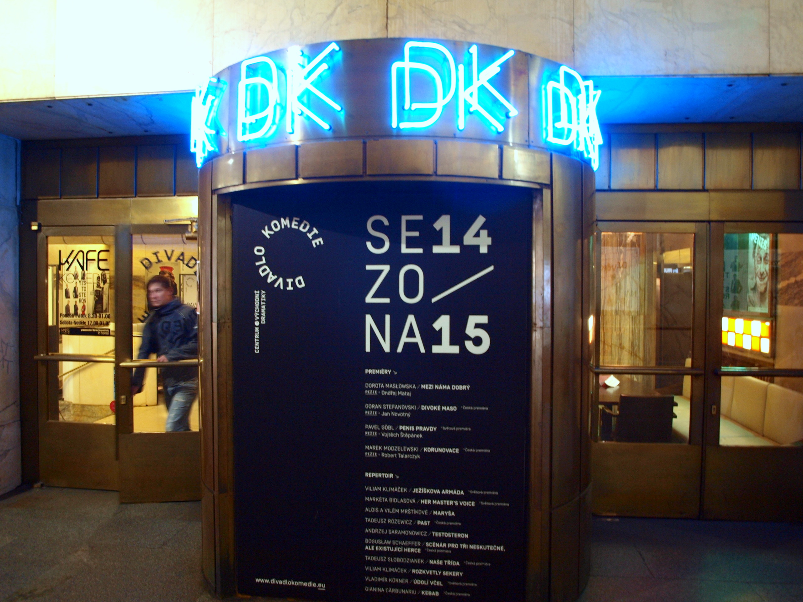 Divadlo Komedie Praha